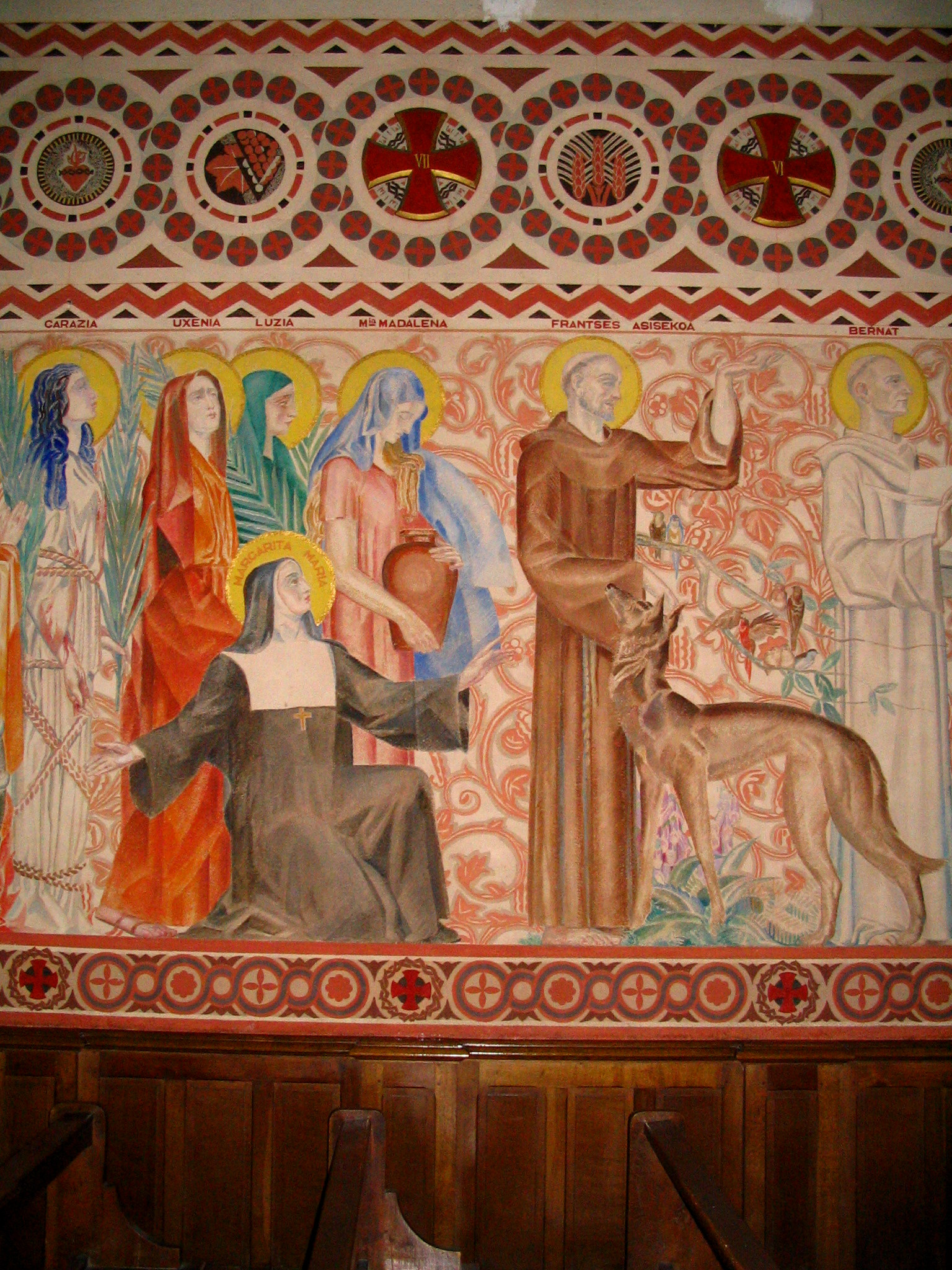 Fresques de Notre Dame du Sacré Coeur-1934- Hasparren - Pyrénées Atlantiques Auteur/author: P.Charpiat - 2006